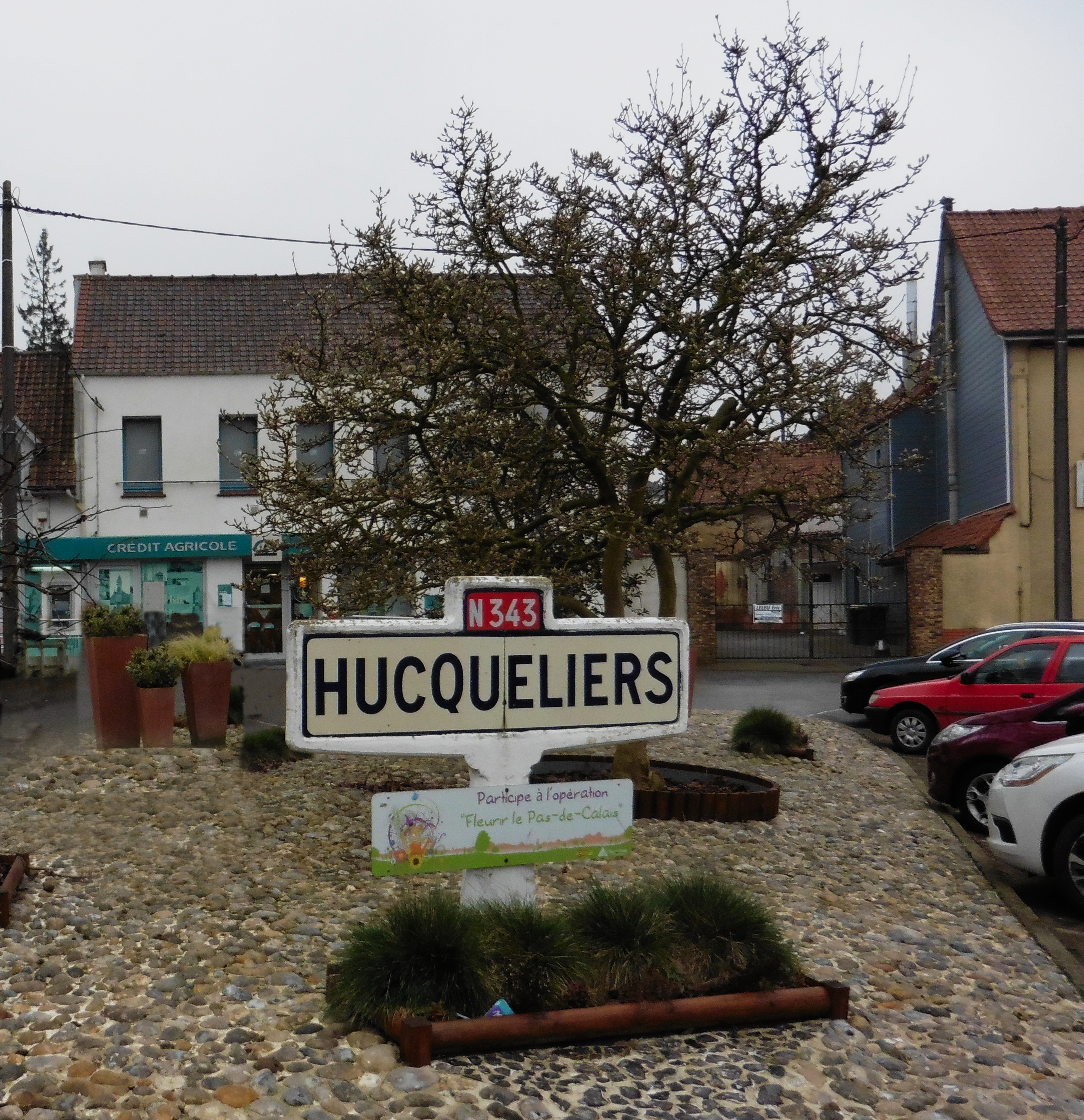 Borne de la commune d' Hucqueliers.- Pas-de-Calais.- France.